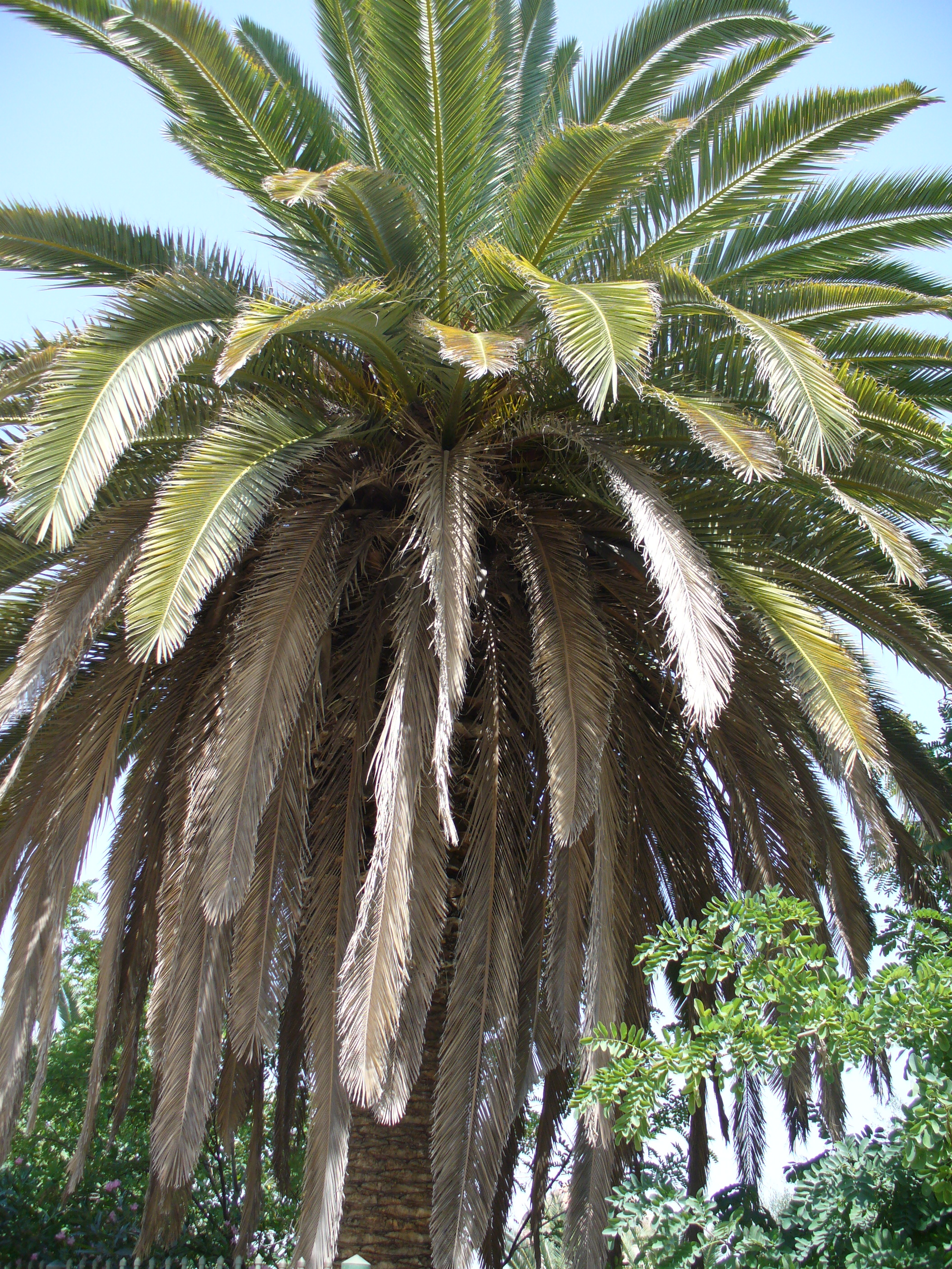 Kanári datolyapálma (Phoenix canariensis) Athénban